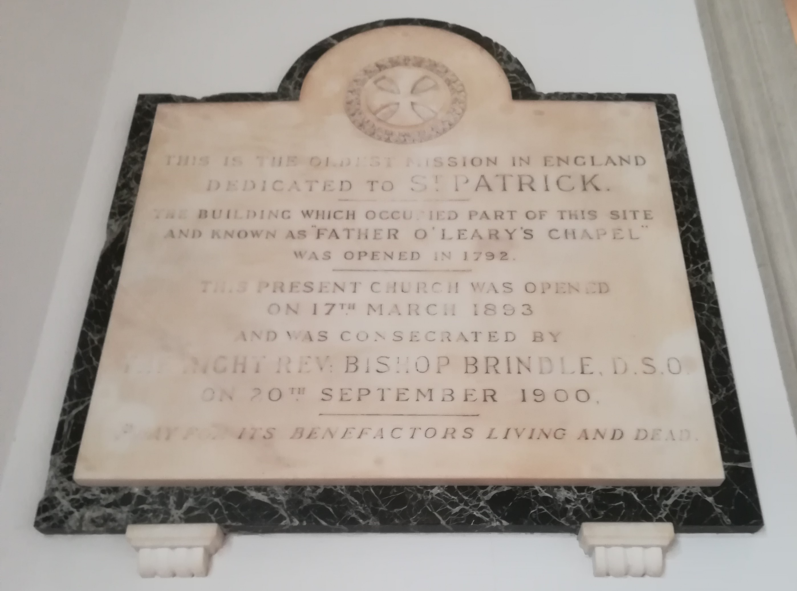 Kościół św. Patryka w Londynie, przy Soho Square.